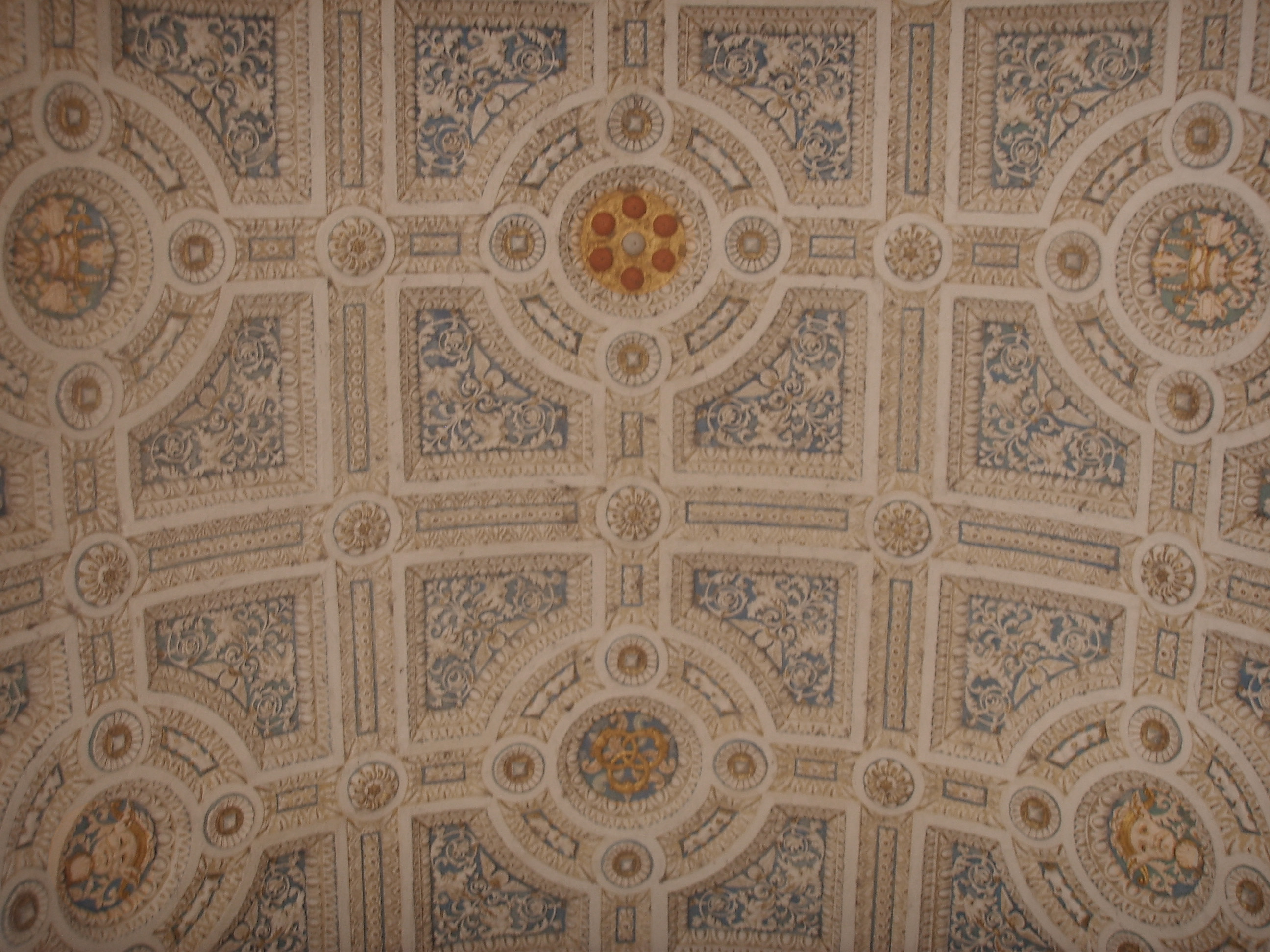 Poggio a Caiano Villa outside view in Poggio a Caiano, Italy